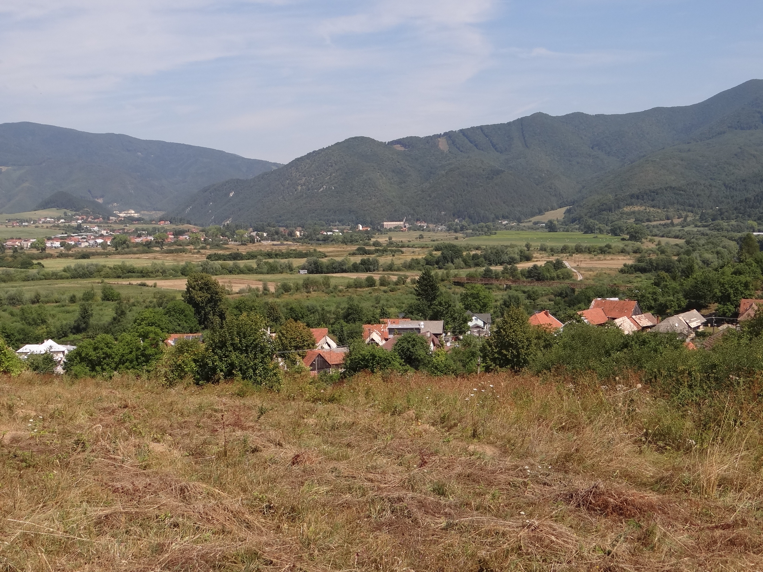 Krpeľany, Nolčovo. Mała Fatra